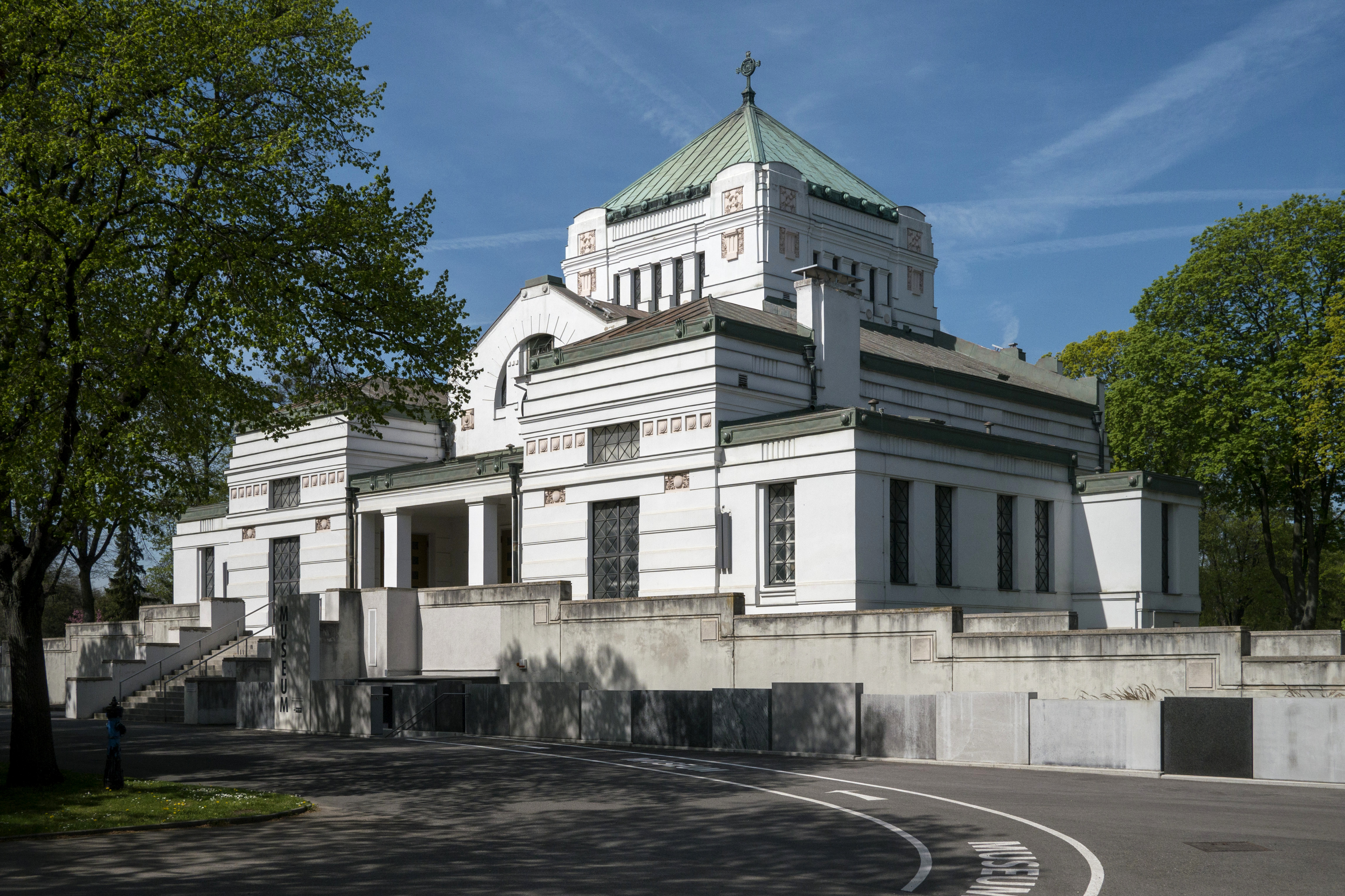 Zentralfriedhof, Aufbahrungshalle 2, Zentralfriedhof, Vienna